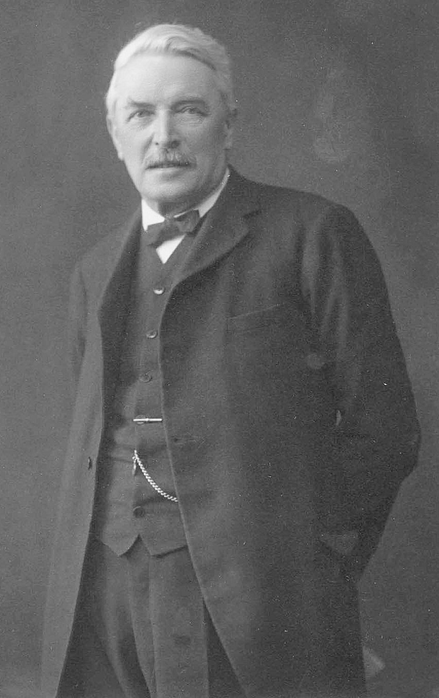 Luca Beltrami, architetto milanese.